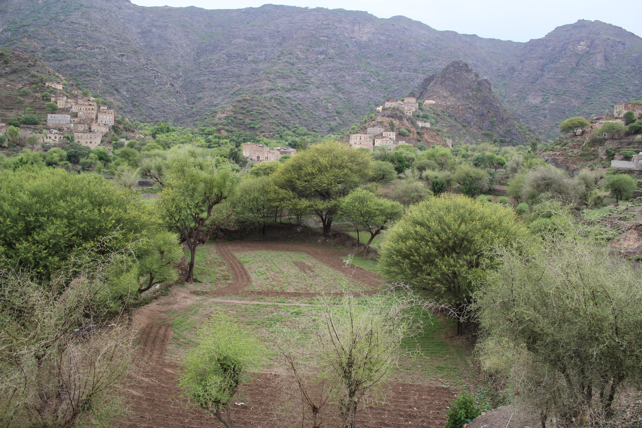 وادي هميريم-ماوية تعز